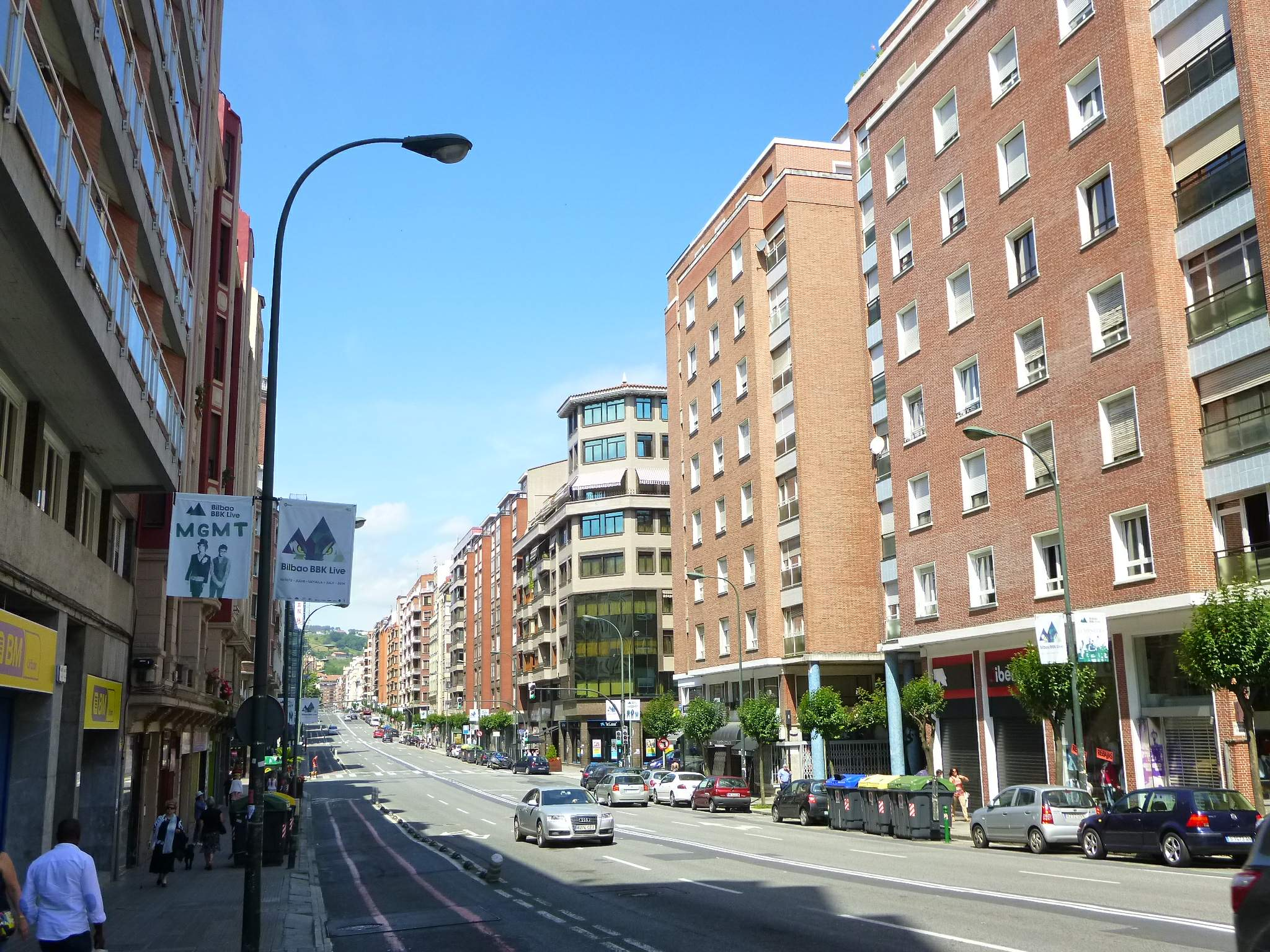 Calle Autonomía (Bilbao)